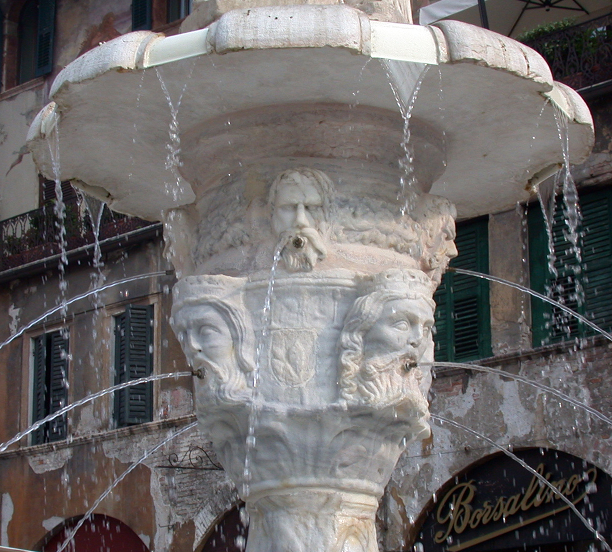 Verona, "Piazza delle Erbe", fountain of "Madonna Verona", basament